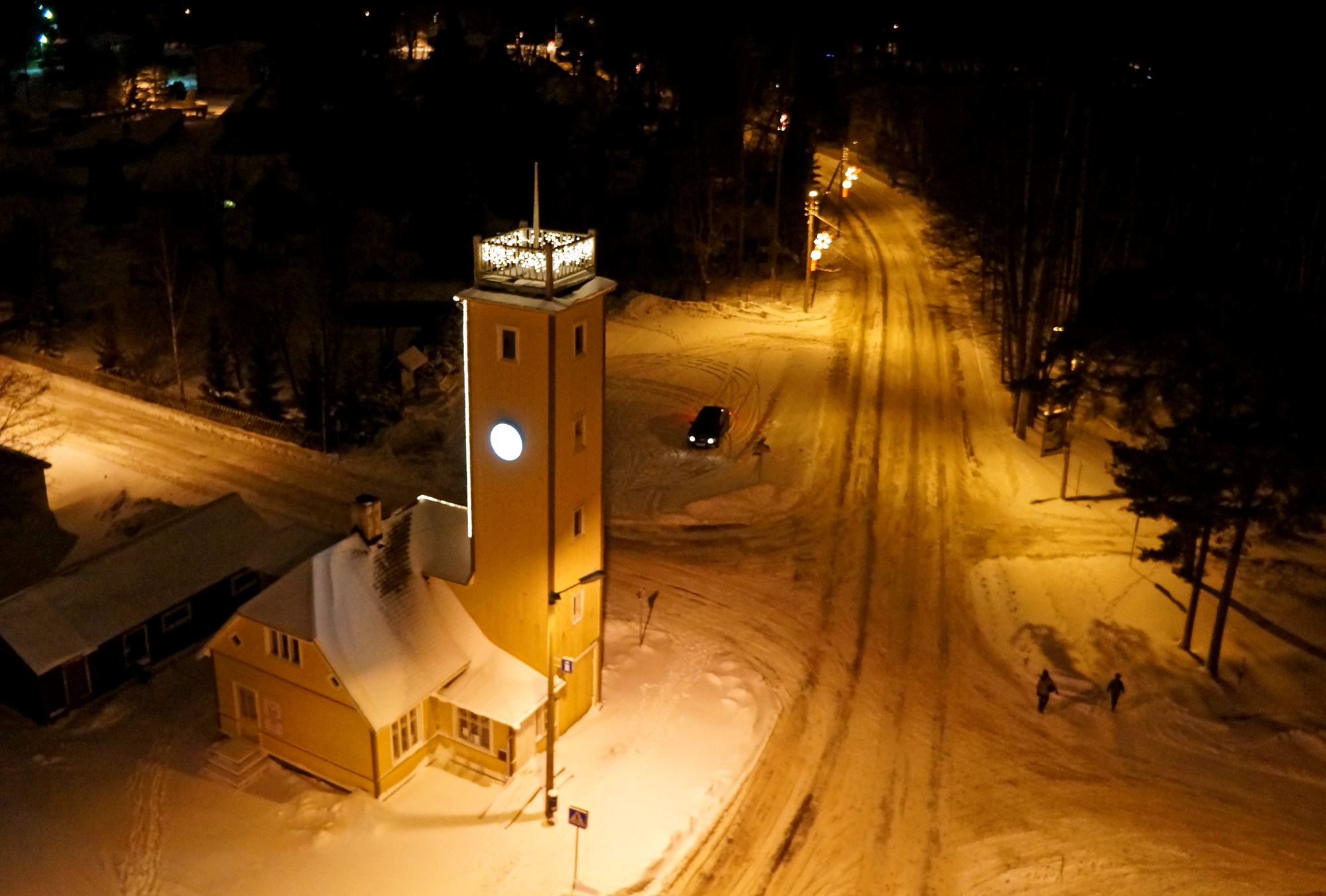 Kärdla tuletõrjemaja öises valguses